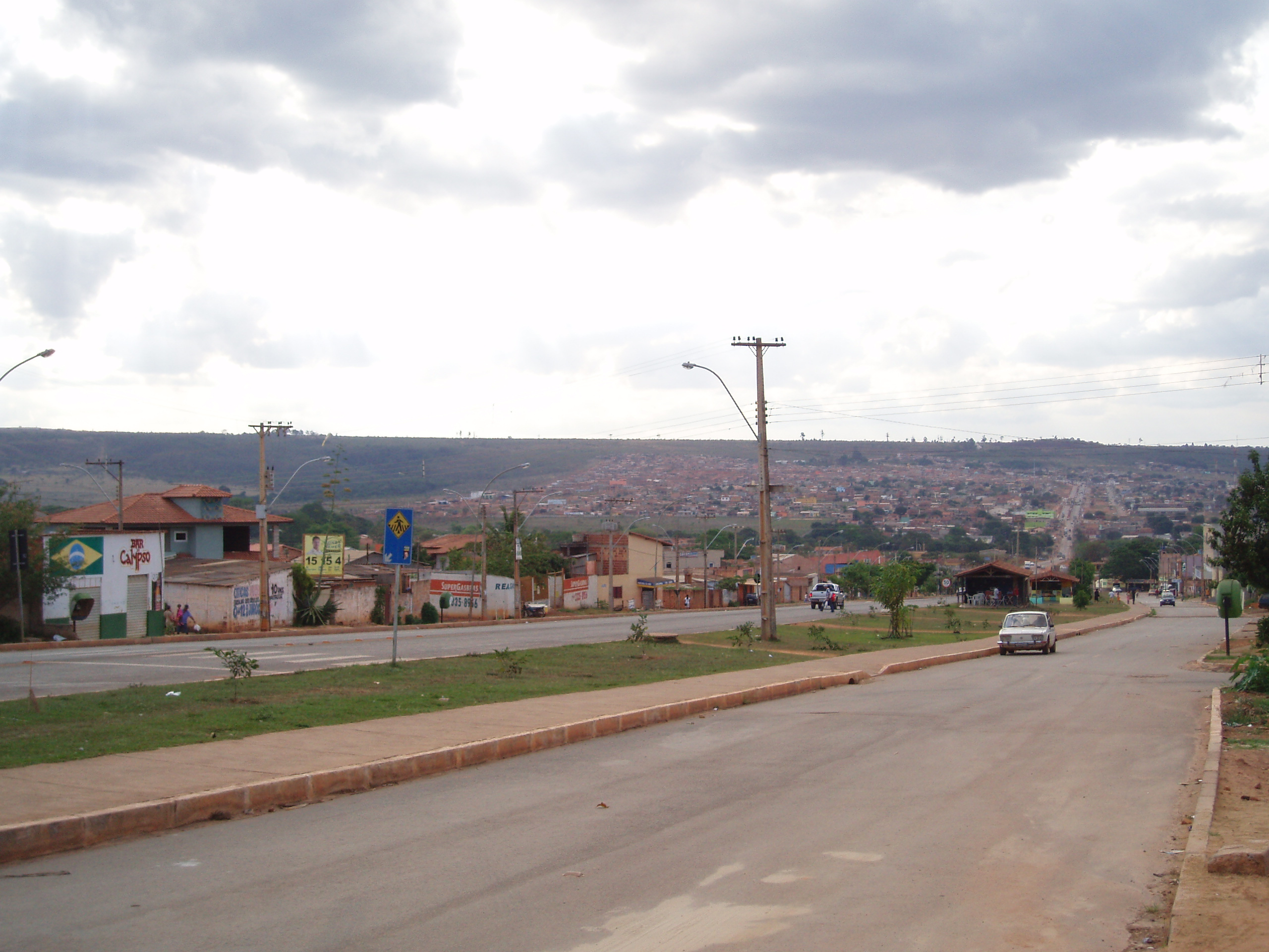 Entrada de São Sebastião, DF, Brasil